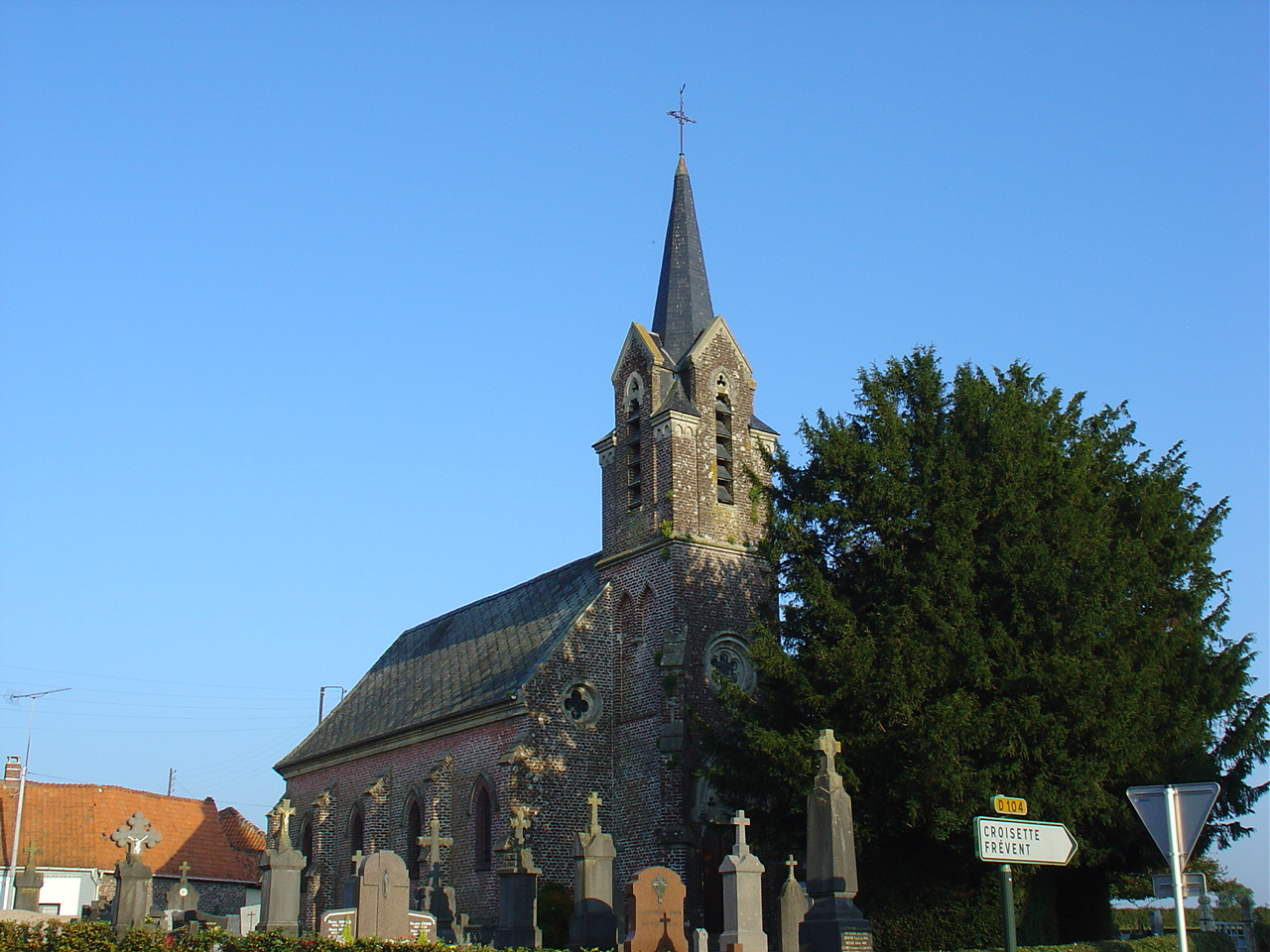 Église de Beauvois